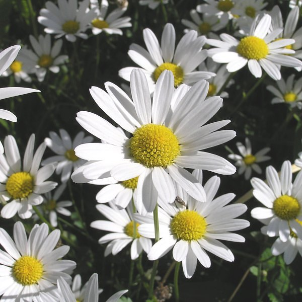 Unbestimmte Art der Asteroideae, vgl. Bestimmungsseite Margeriten (Leucanthemum spec)